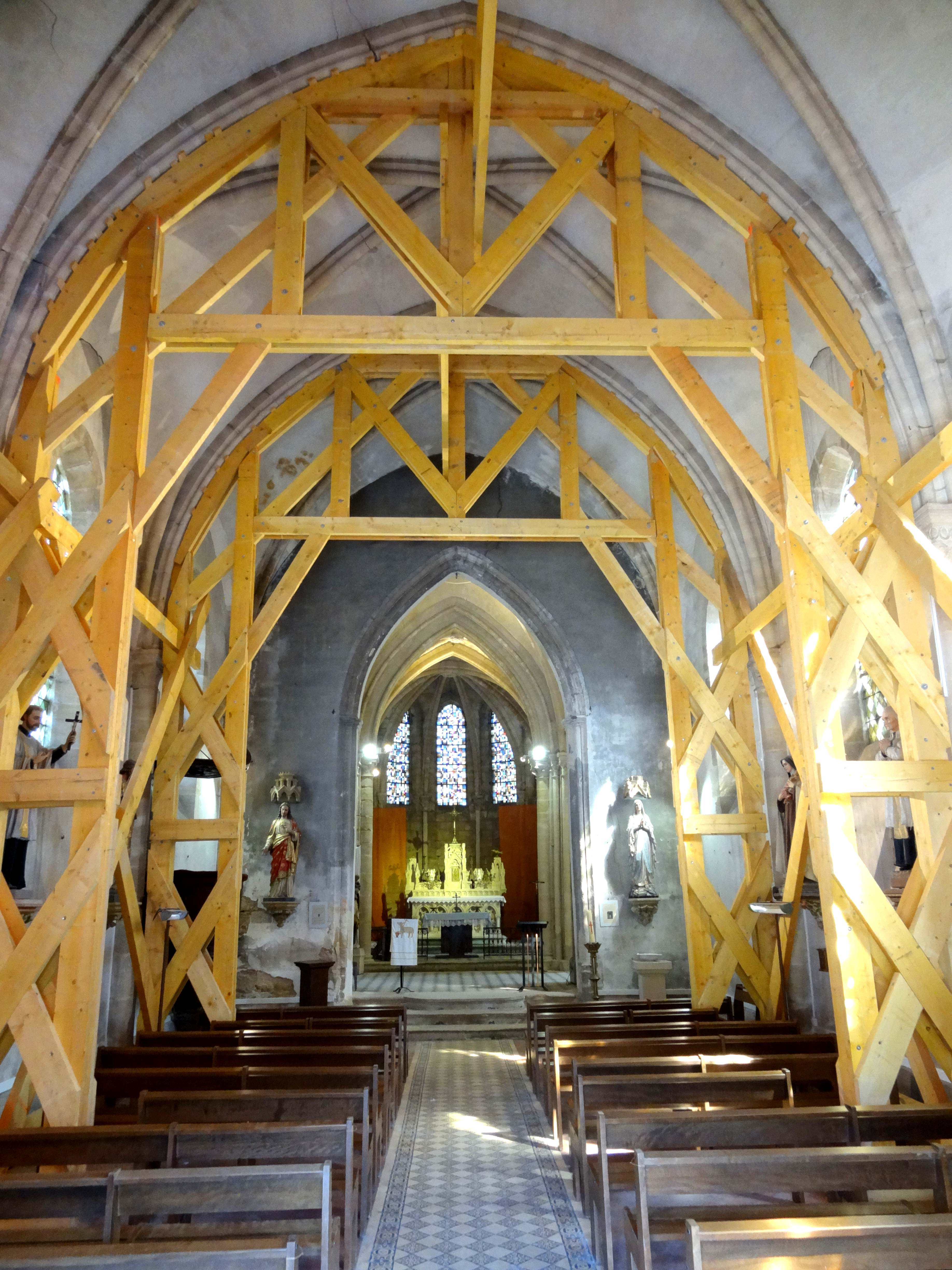 Intérieur de l'église - voir titre.